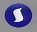 통일민주당 심볼 Unification Democratic Party Symbol